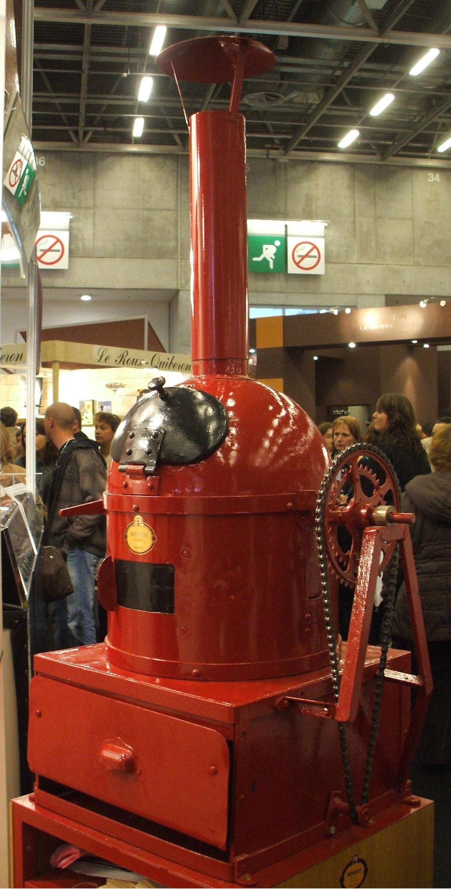 ancien torefacteur a gaz pour les féves de chocolat